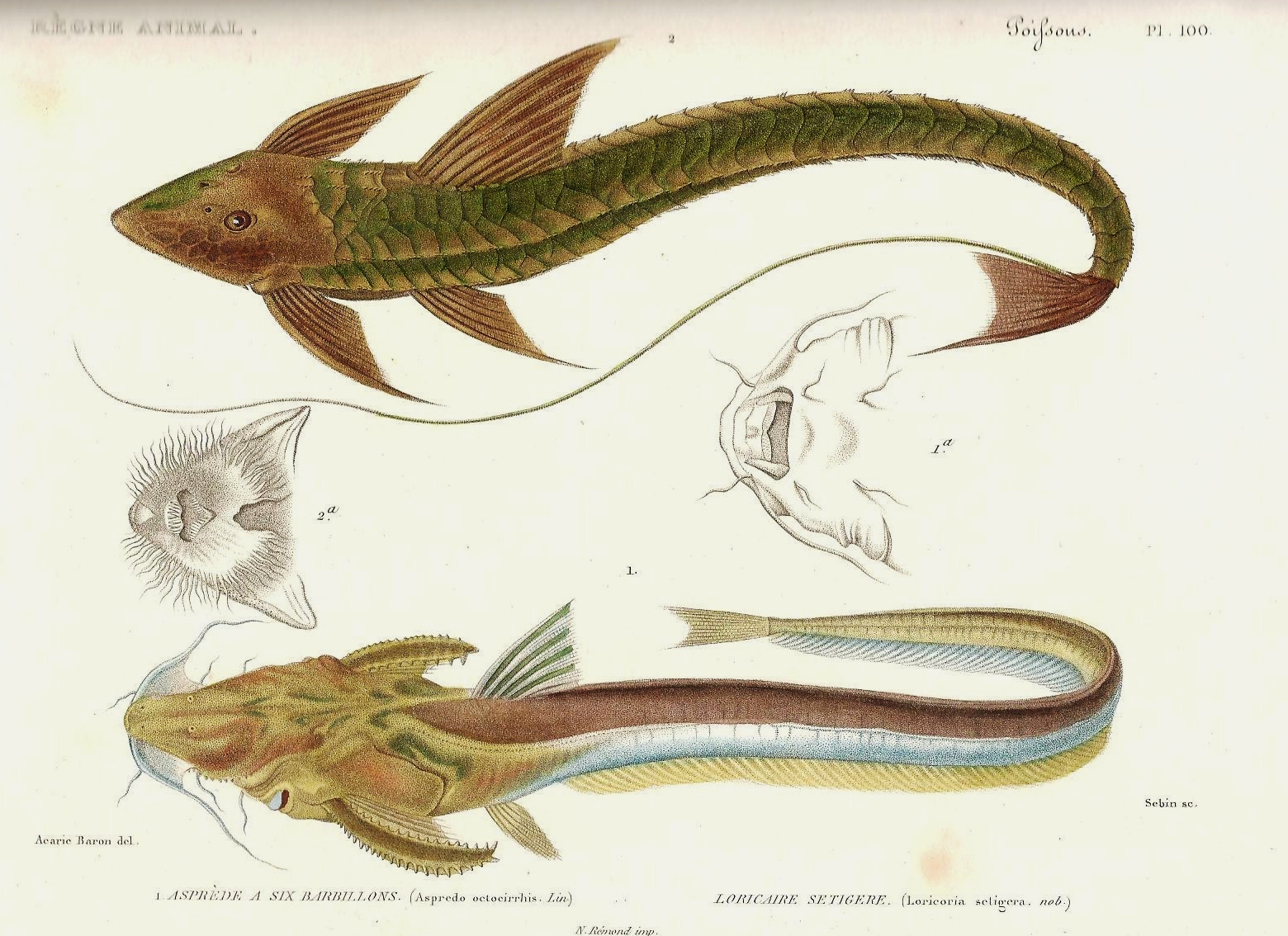 Planche N° 100 du livre "Le règne animal distribué d'après son organisation" par Georges Cuvier (Tome 8), seconde édition de 1828, représentant : -en haut : Loricaria cataphracta syn. L. dura syn. L. setigera -en bas : Aspredo octocirrhis (=A. aspredo